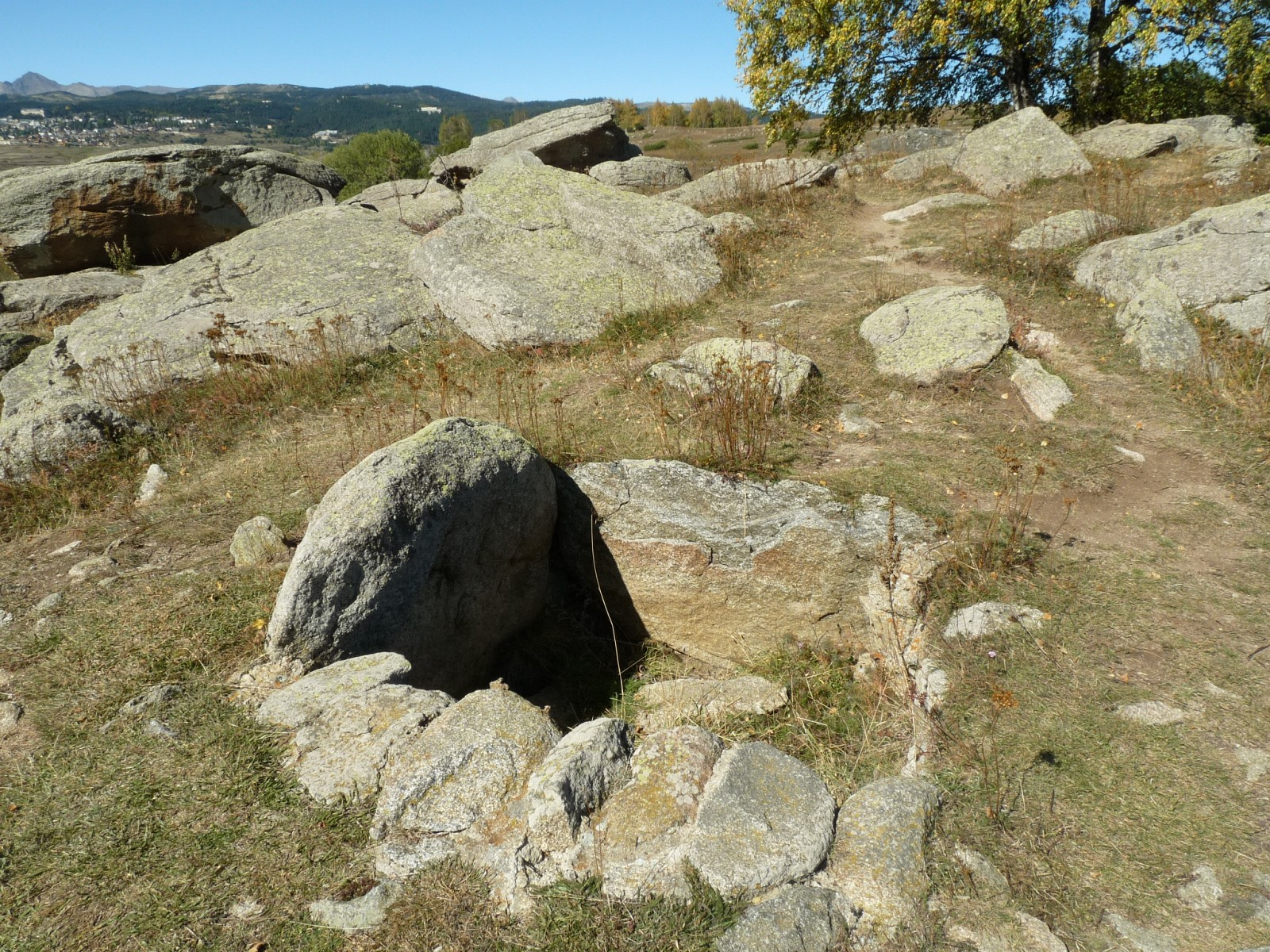 Dolmen del Pou, Eyne, Pyrénées-Orientales, France